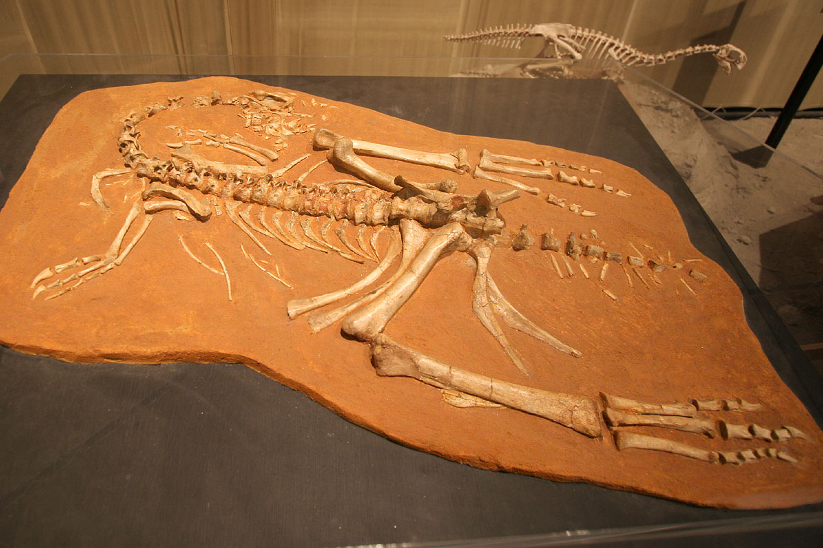 Ingenia - 01